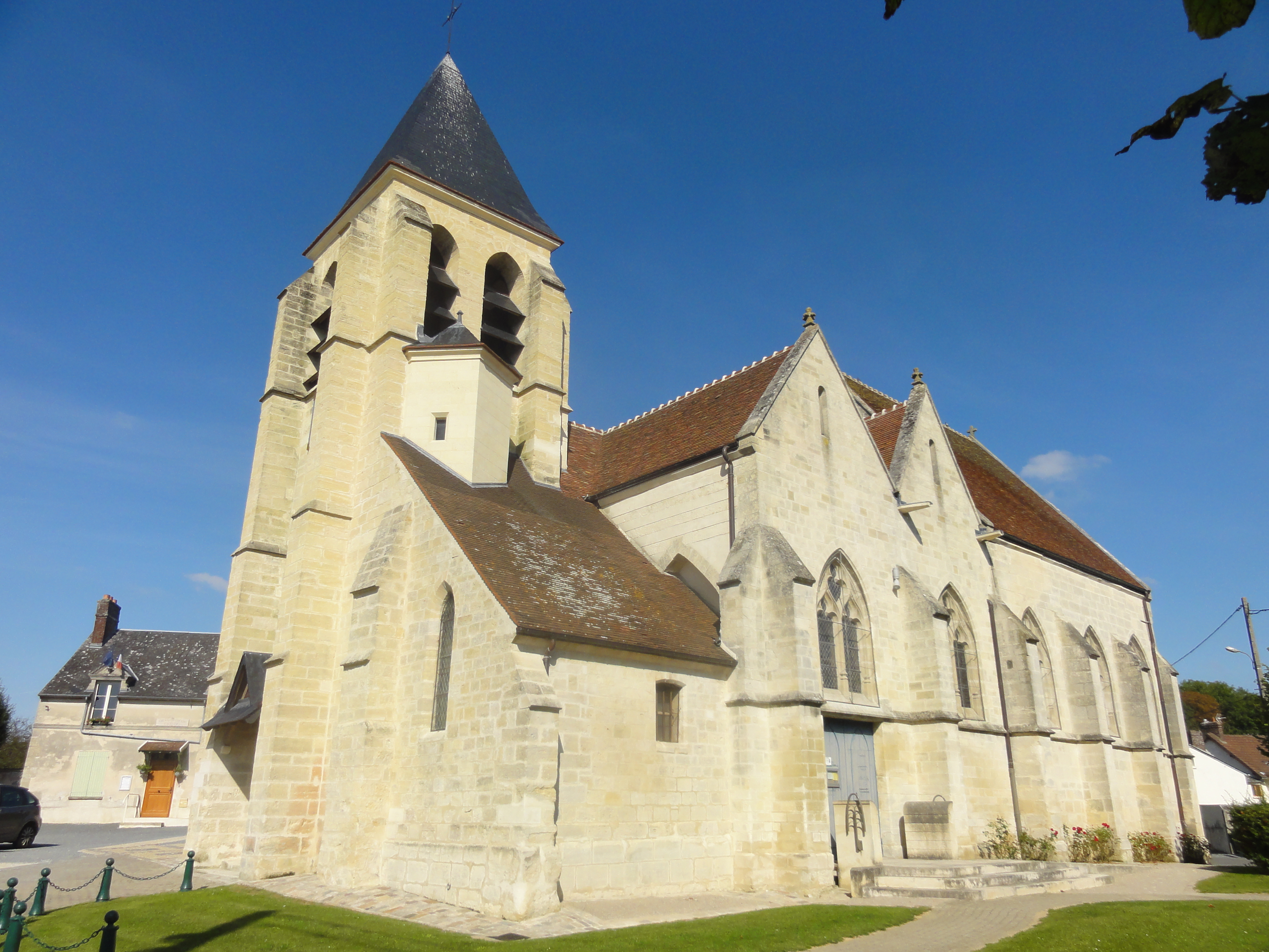 Église Saint-Jean-Baptiste de Crouy-en-Thelle (voir titre).